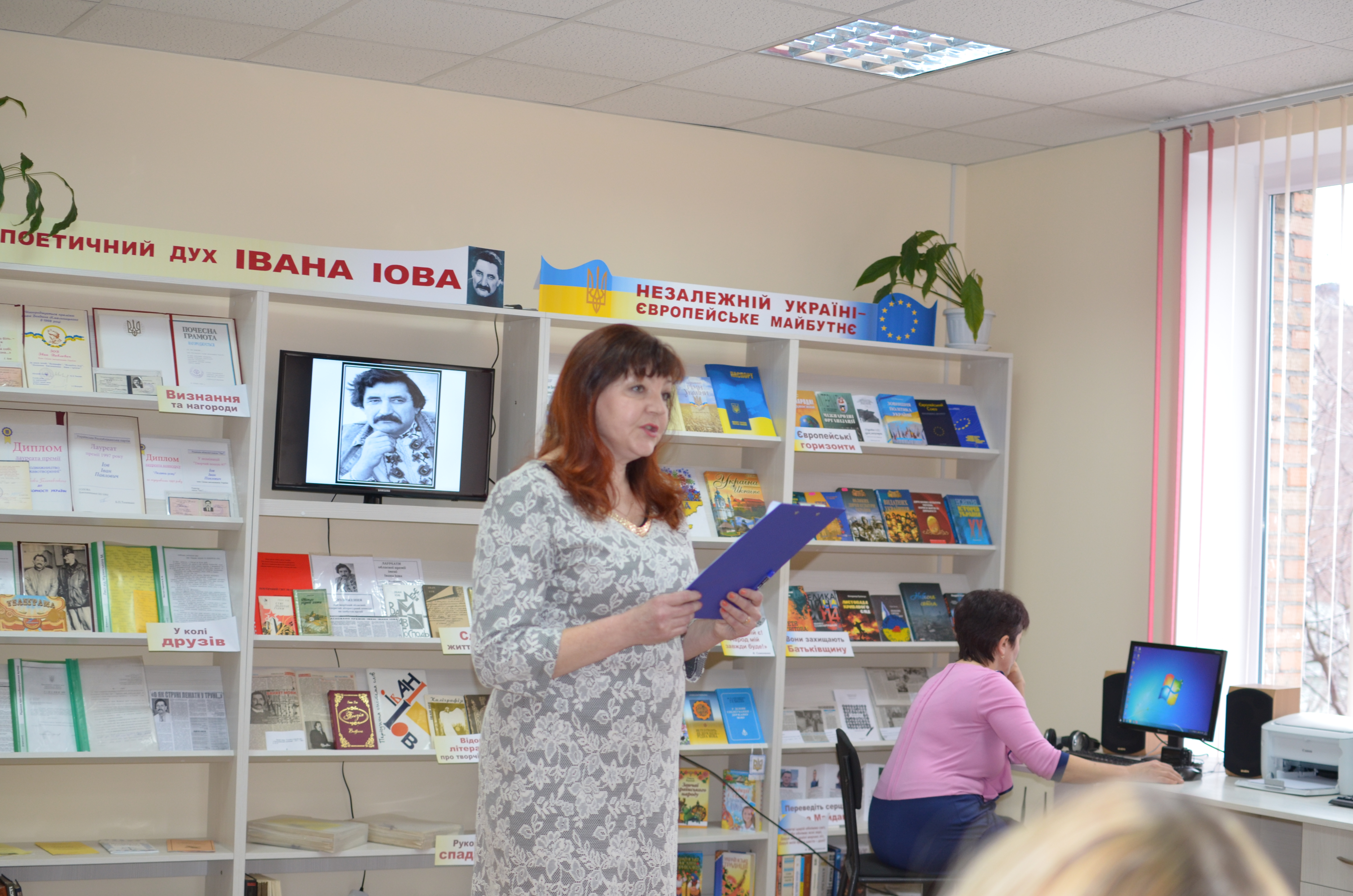 Завідуюча бібліотекою-філією№8 Людмила Дуда розповідає про письменників міста Хмельницького.